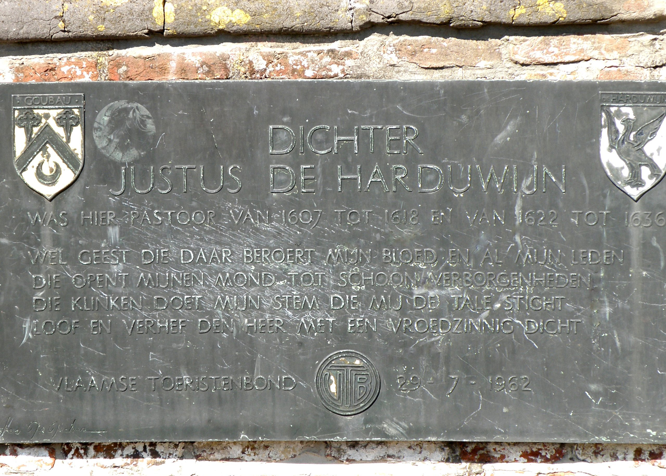 Mespelare, deelgem. v. Dendermonde (Oost-Vl.). Gedenkplaat dichter Justus de Harduwijn.